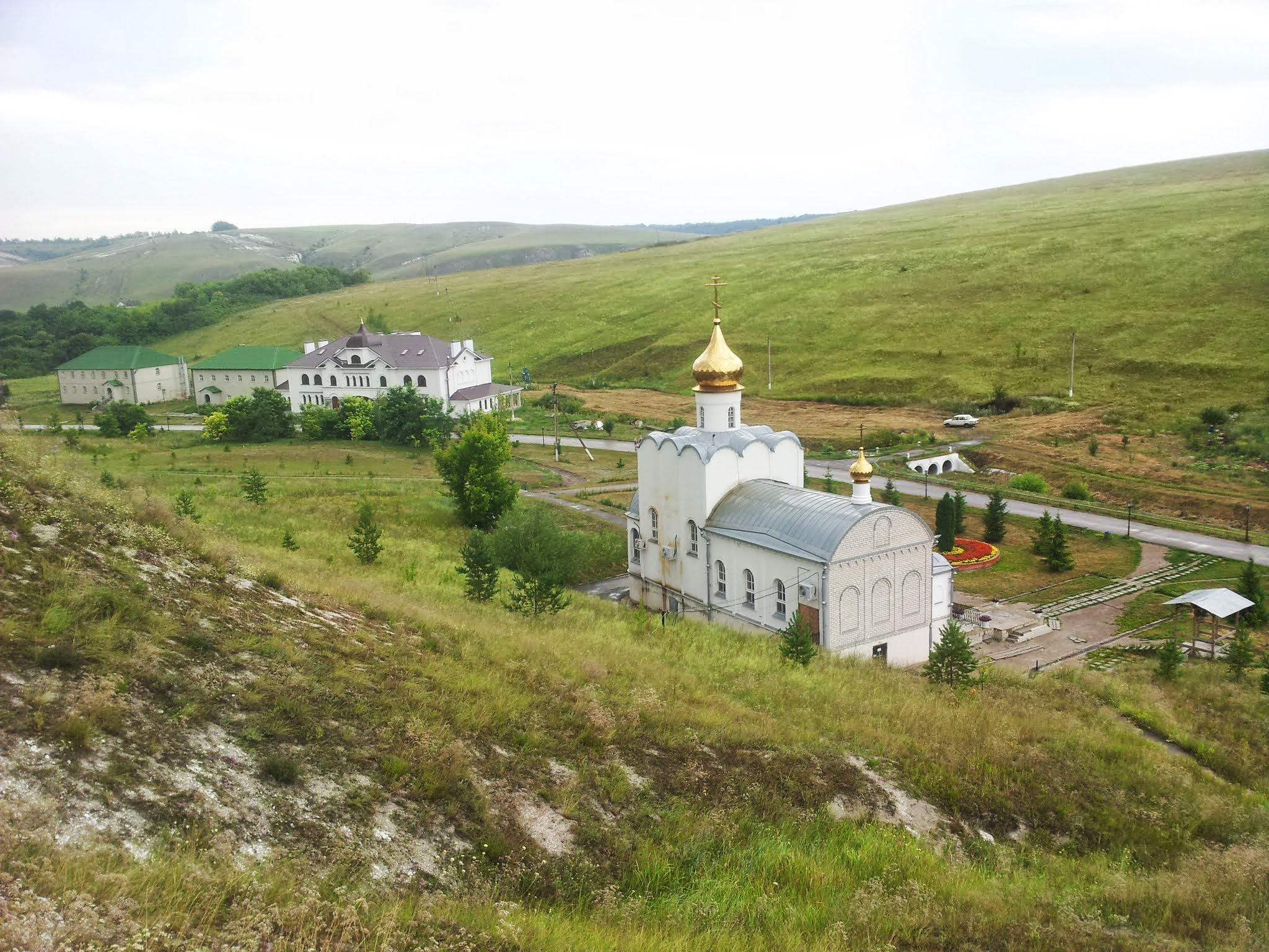 Podgorensky District, Voronezh Oblast, Russia